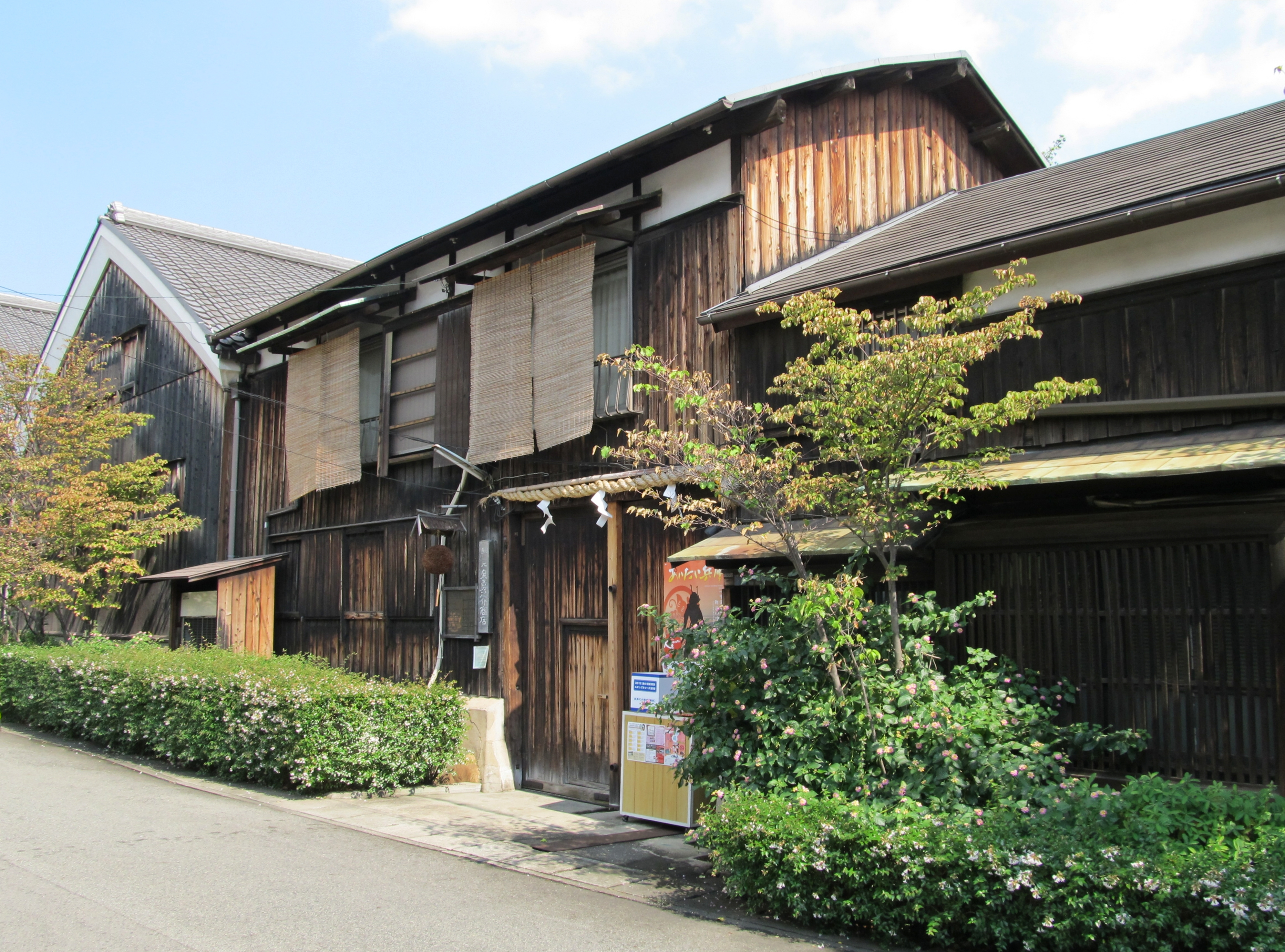 泉勇之介商店。灘五郷唯一の木造酒蔵をもつ造り酒屋。国の登録有形文化財。所在地は兵庫県神戸市東灘区御影塚町。